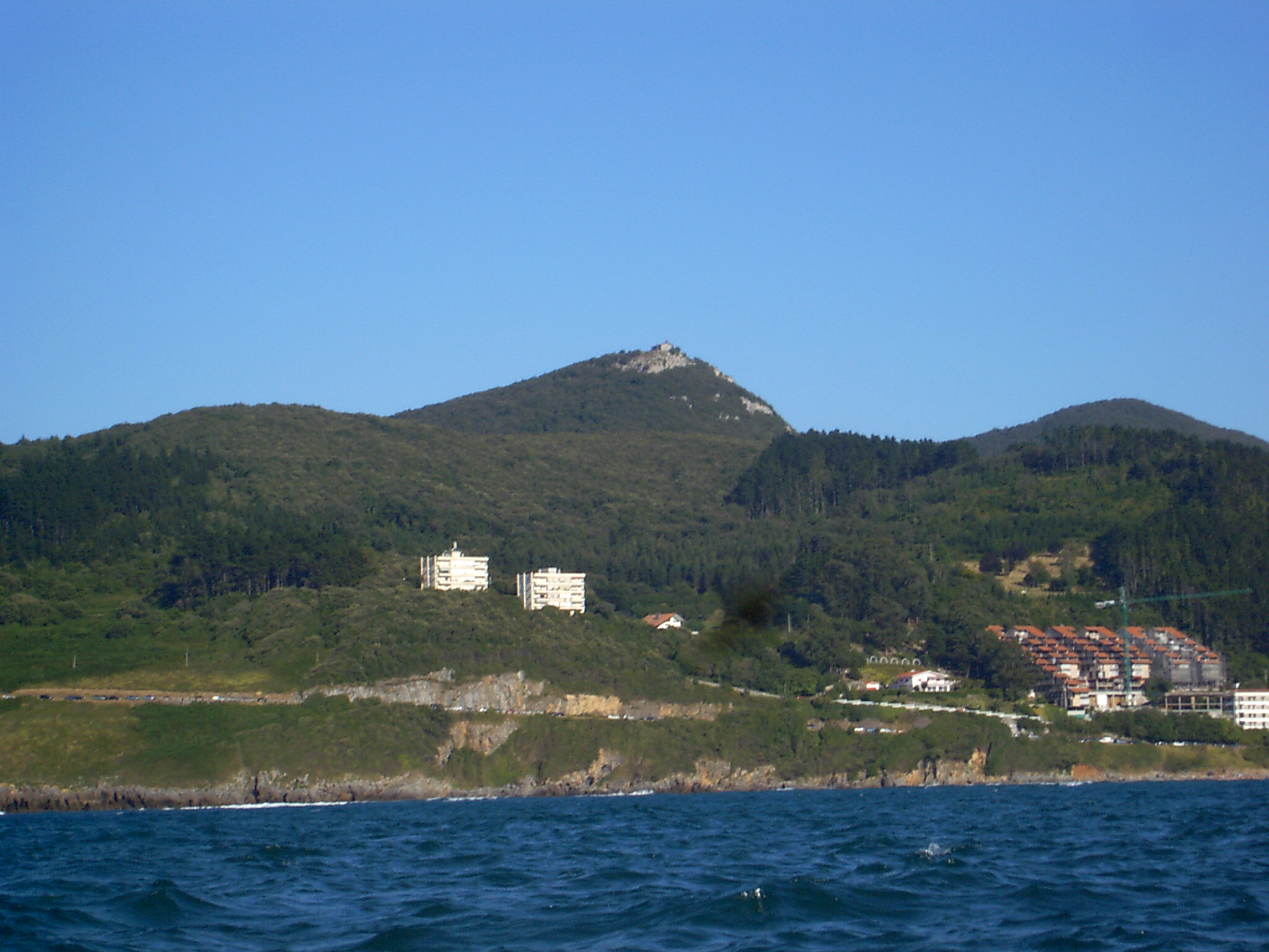 San Pedro atxarre itsasotik